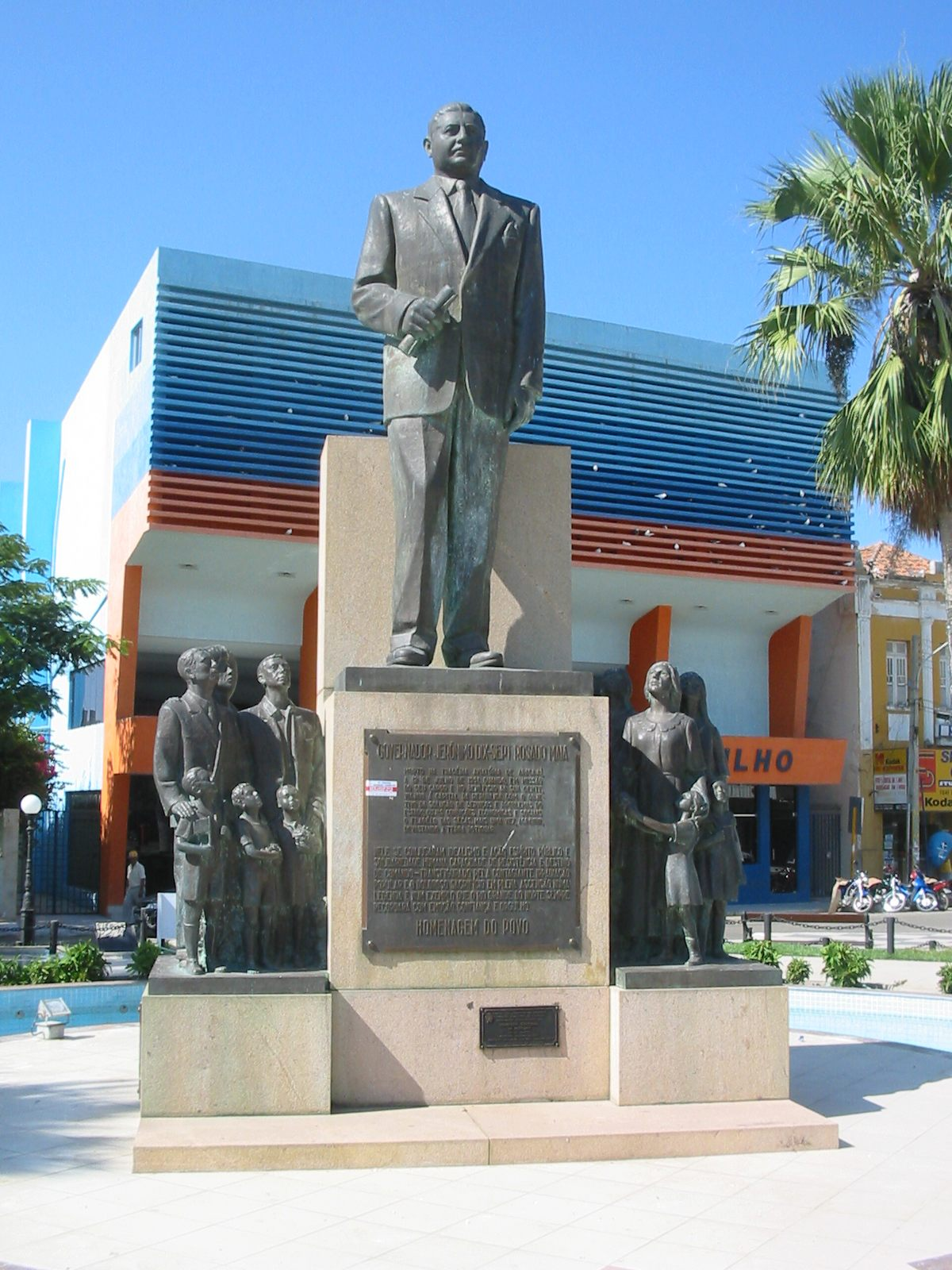 Mossoró (Rio Grande do Norte), Brasil. Estátua de Jerônimo Dix-Sept Rosado Maia. Statue of Jerônimo Dix-Sept Rosado Maia. Mossoró (Rio Grande do Norte), Brazil.